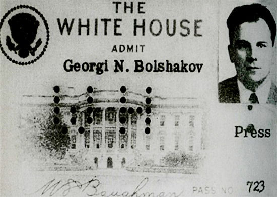 Пресс-пропуск Георгия Никитовича Большакова в Белый Дом (1960-е годы)